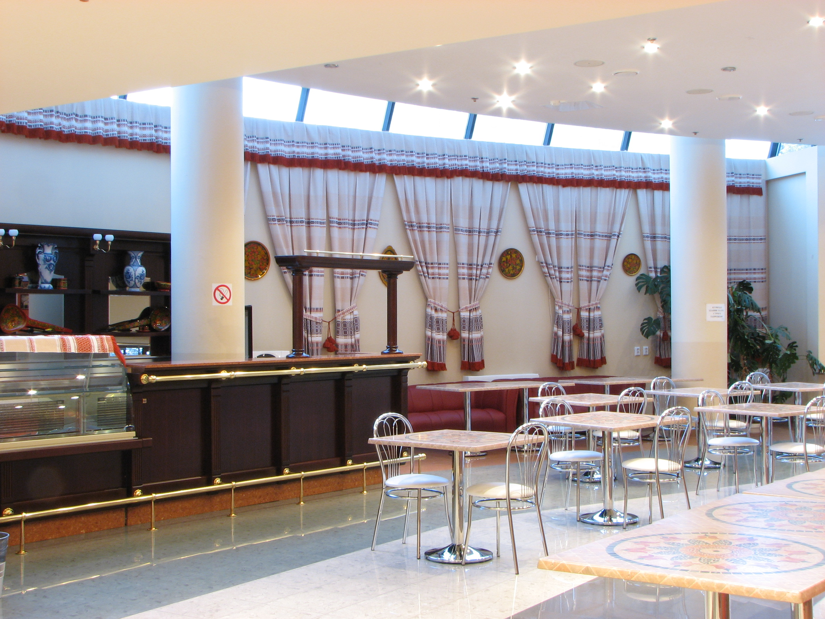 Буфет МКФЦ фойе второго этажа